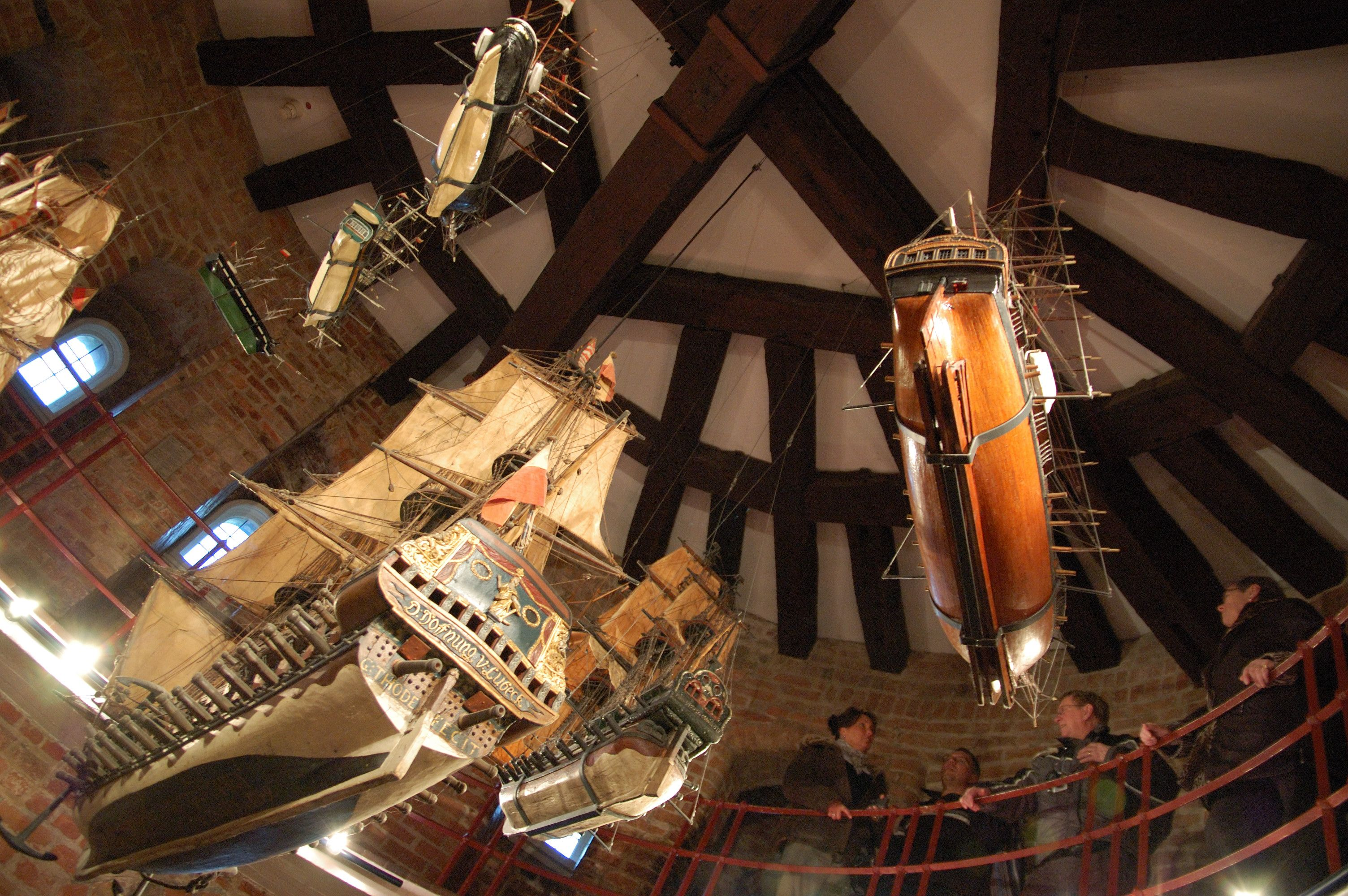 Ship models inside Holstentor, Lübeck